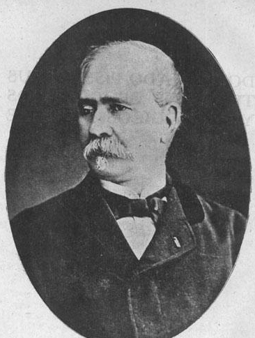 Amadeo Pissis